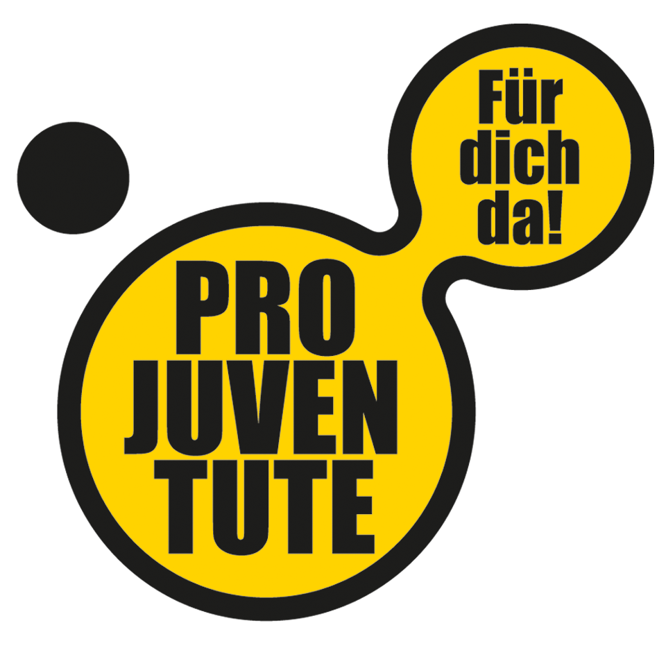 Offizielles Logo der Stiftung Pro Juventute